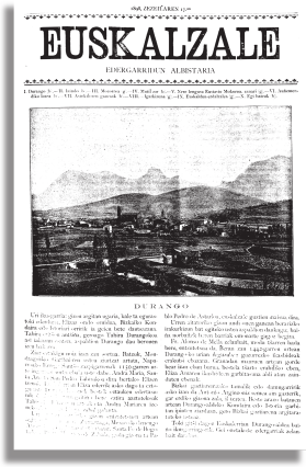 Euskaltzale. Euskal prentsaren hastapenak.